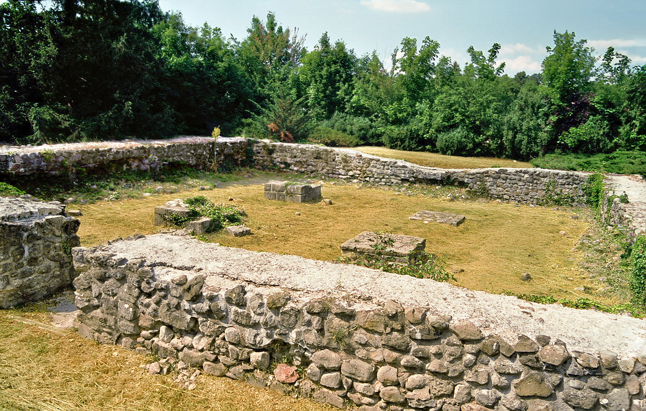 Burgus Leányfalu/Ungarn – Burgus Cirpi 2: Blick von Süden.